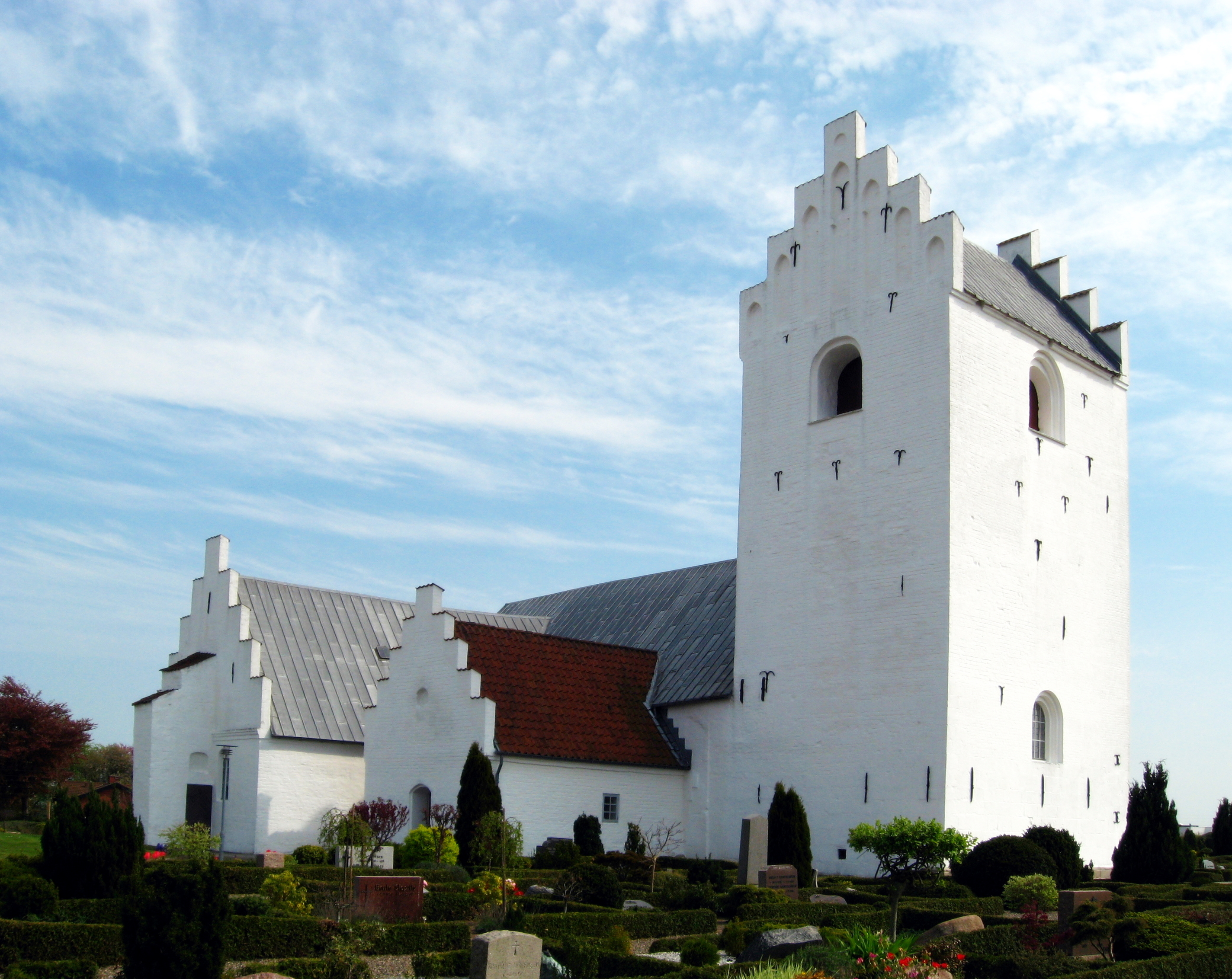 Jerslev Kirke / Brønderslev Kommune